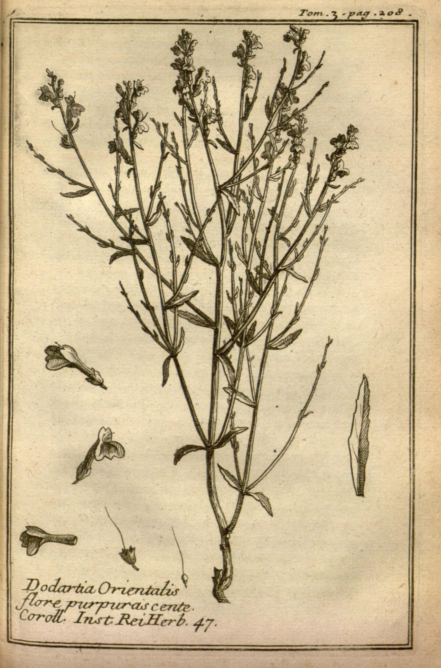 ■vrr-*"